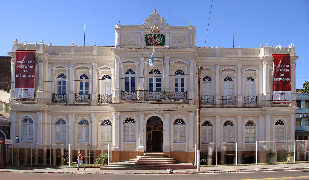 Prédio histórico da Beneficência Portugueza em Porto Alegre, Brasil, hoje sede do Museu de História da Medicina do Rio Grande do Sul